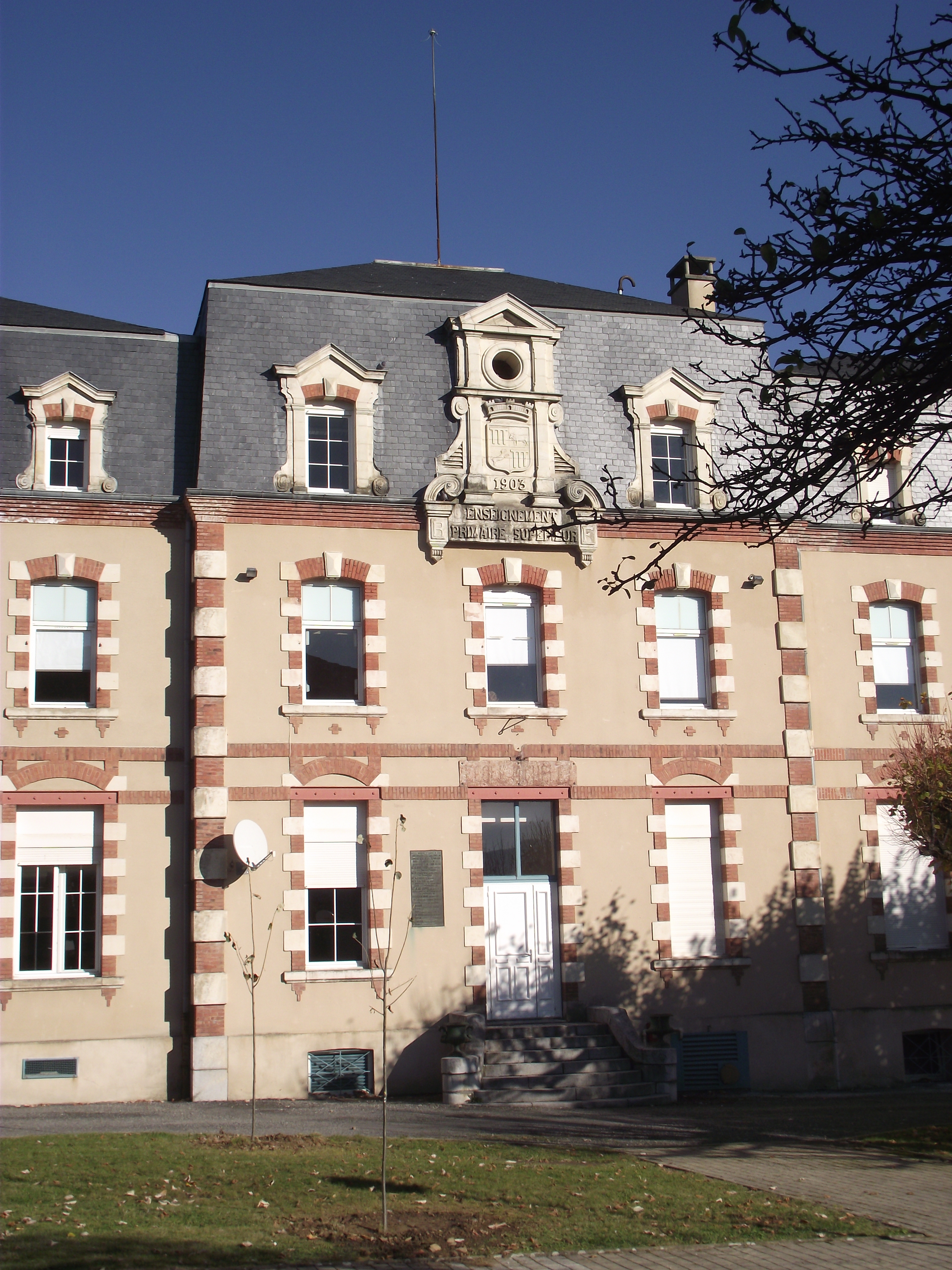 Lycée Michelet (Lannemezan, Hautes-Pyrénées, France)